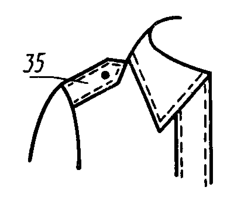 Изображение из ГОСТ 22977-89 (СТ СЭВ 6484-88) — Детали швейных изделий. Термины и определения.